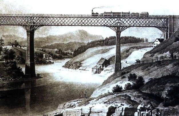 König-Ludwig-Brücke: König-Ludwig-Brücke um 1853 von Eberhard Emminger